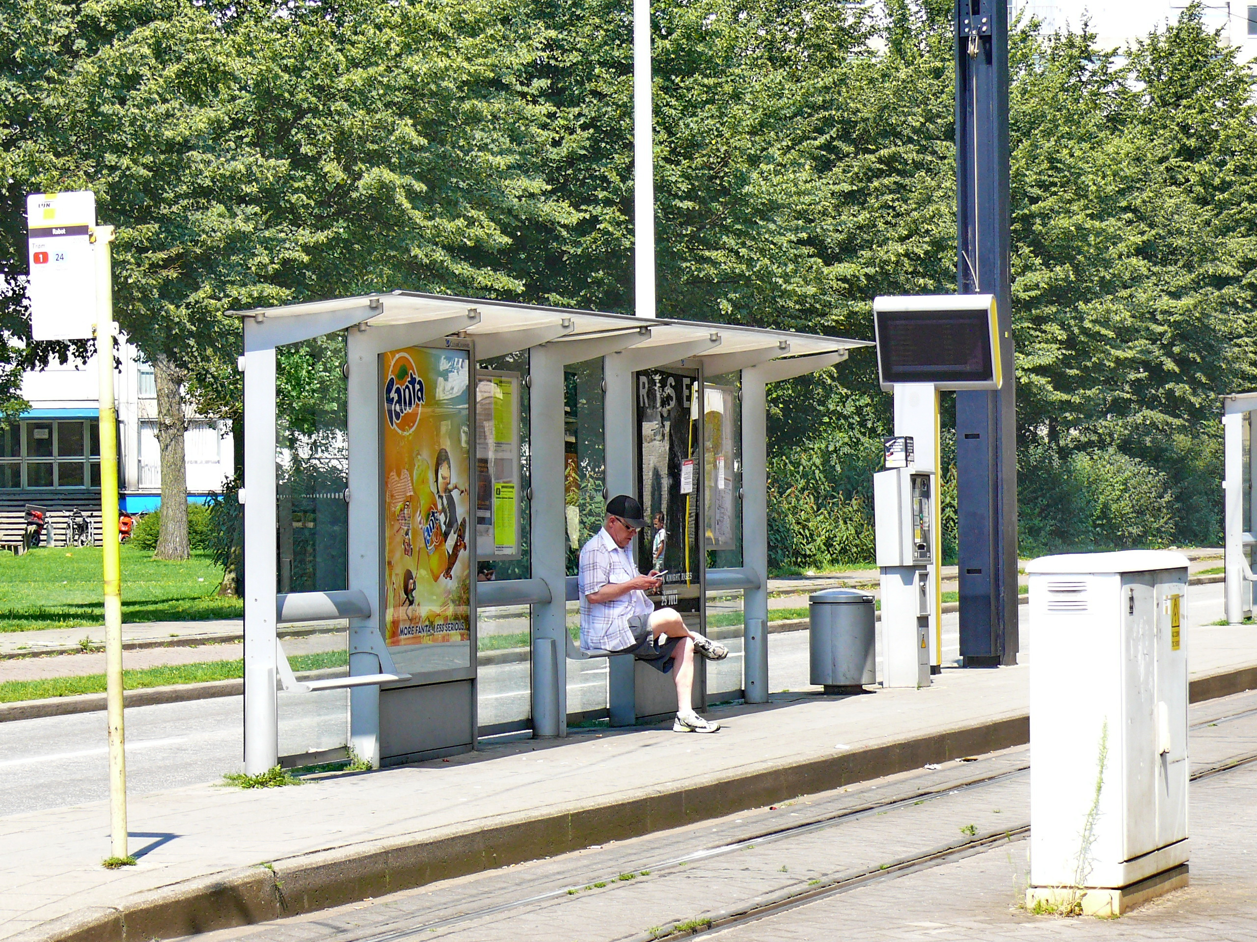 Tramway de Gand - Aménagement de la station Rabot : Noter l'écran vidéo d'information voyageurs et le distributeur de billets